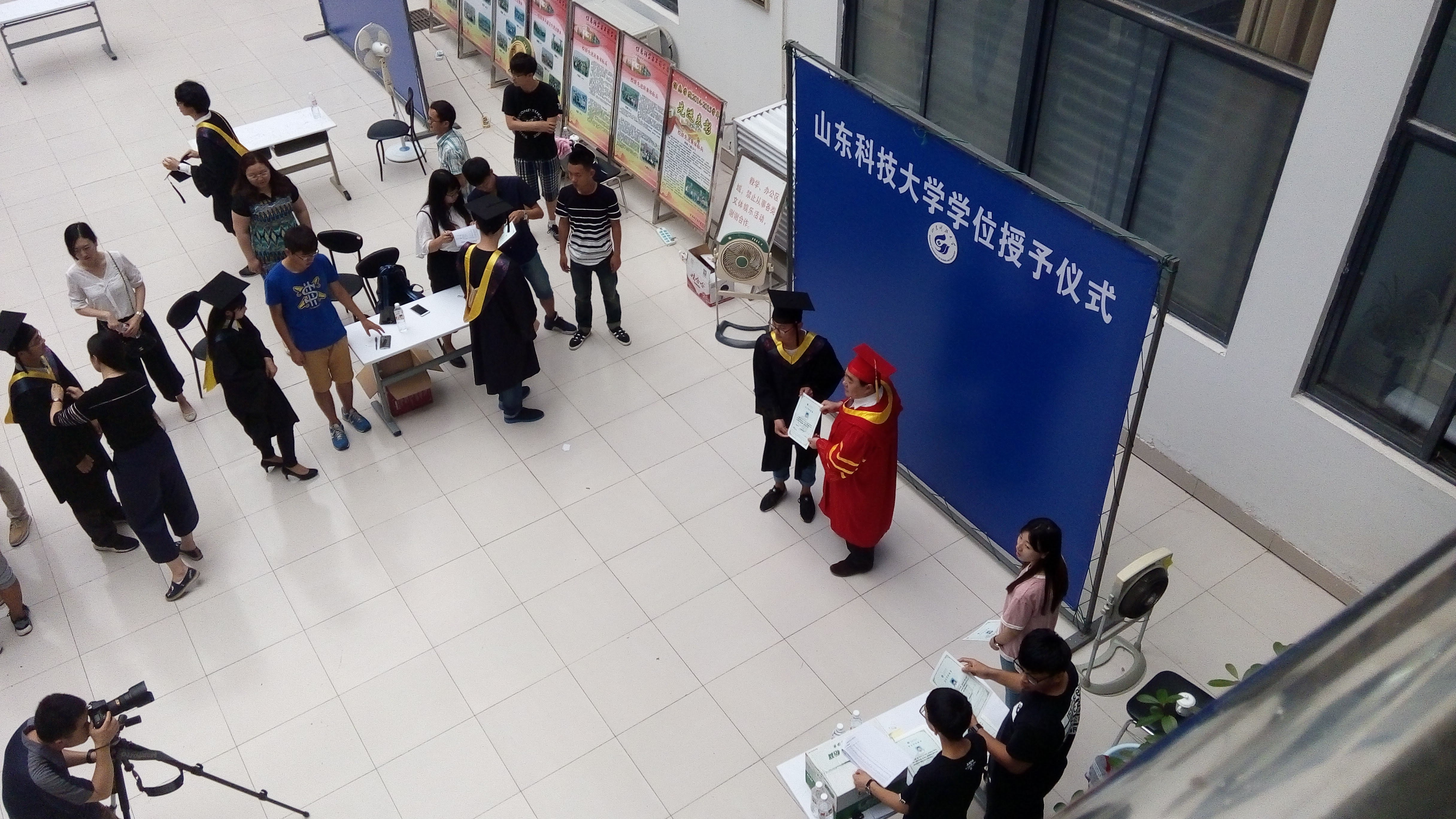 中文（中国大陆）: 2016年山东科技大学学位授予仪式，摄于计算机科学与工程学院